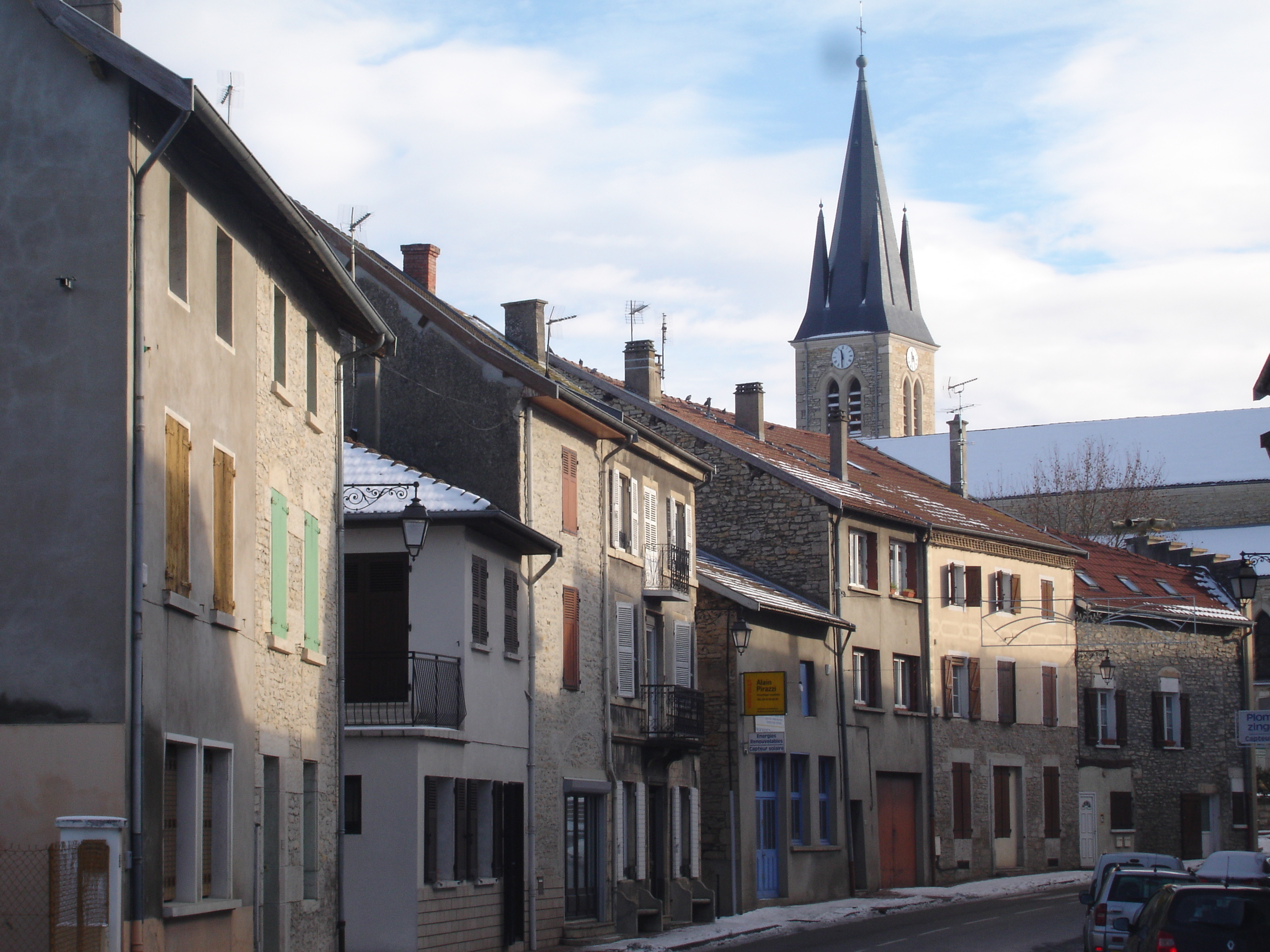 Trept (Isère) : la rue principe et le clocher de l'église